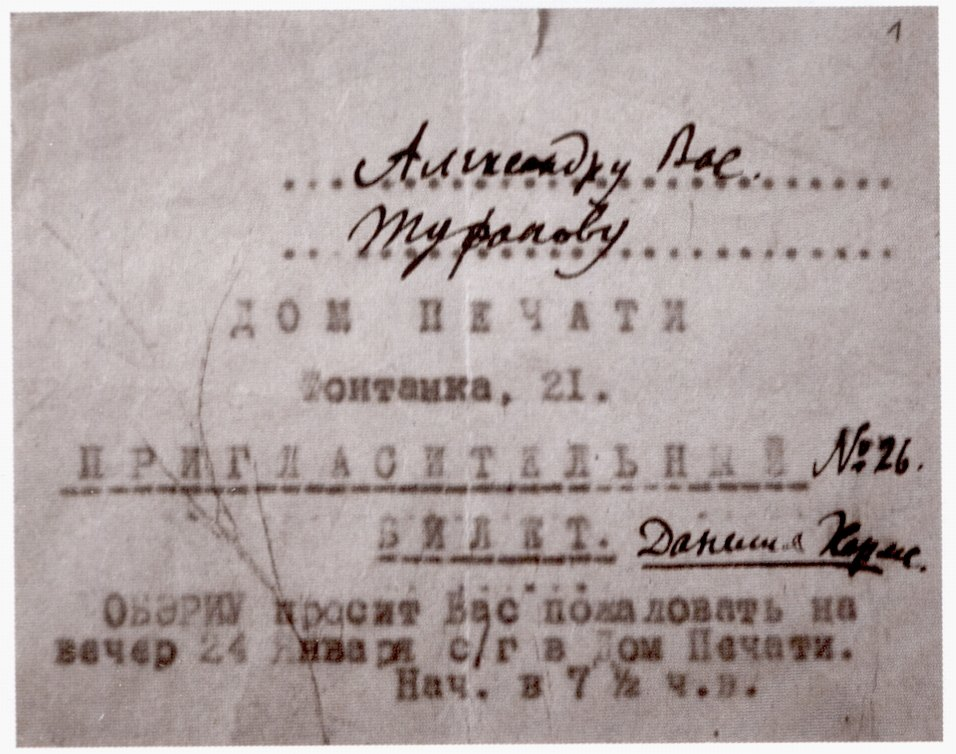 Приглашение поэту А. Туфанову на литературный вечер "Три левых часа" (24.01.1928)